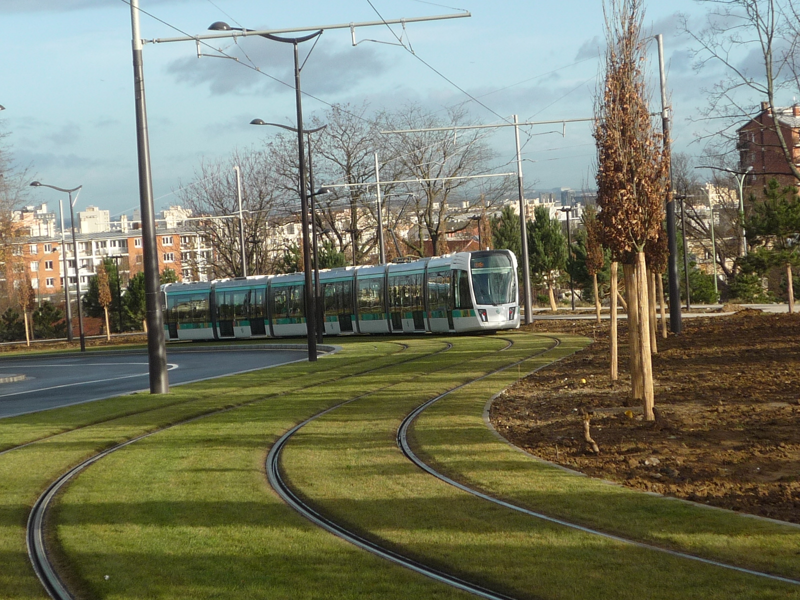 Tram T3 de PARIS près du parc de la Butte rouge peu après son inauguration.